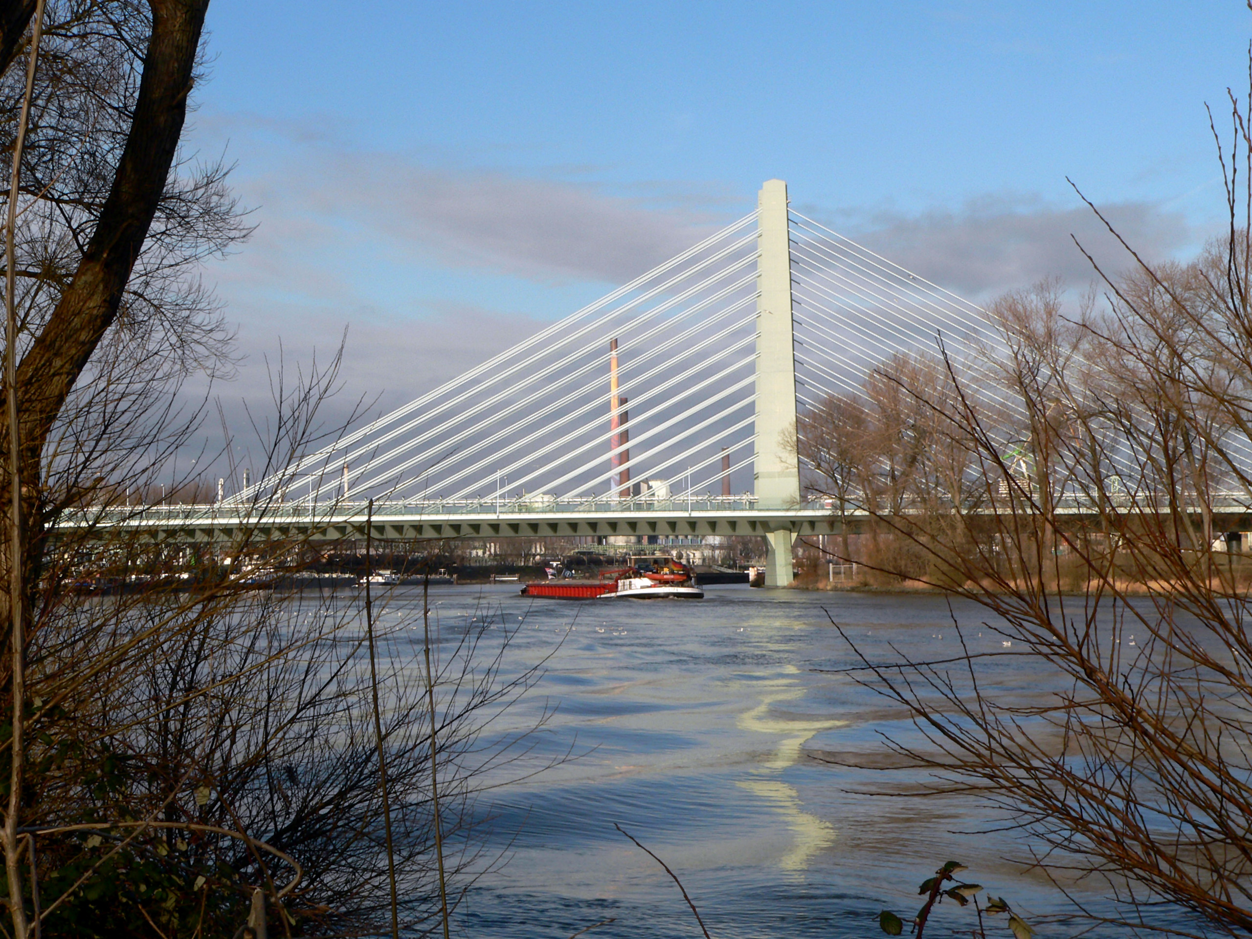 Werksbrücke West des Industrieparks Höchst, Blick von Südwest